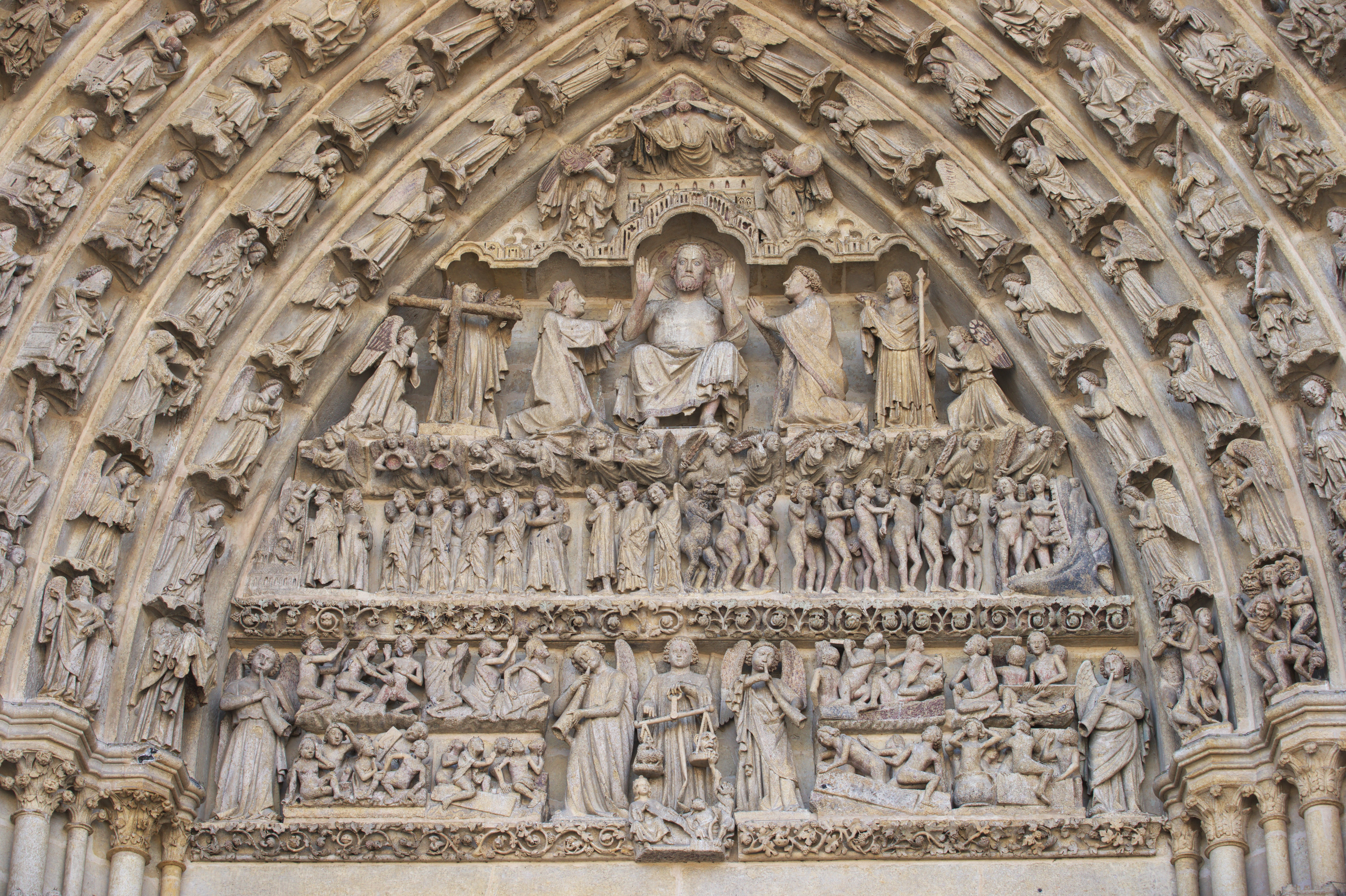 Amiens tympan central .